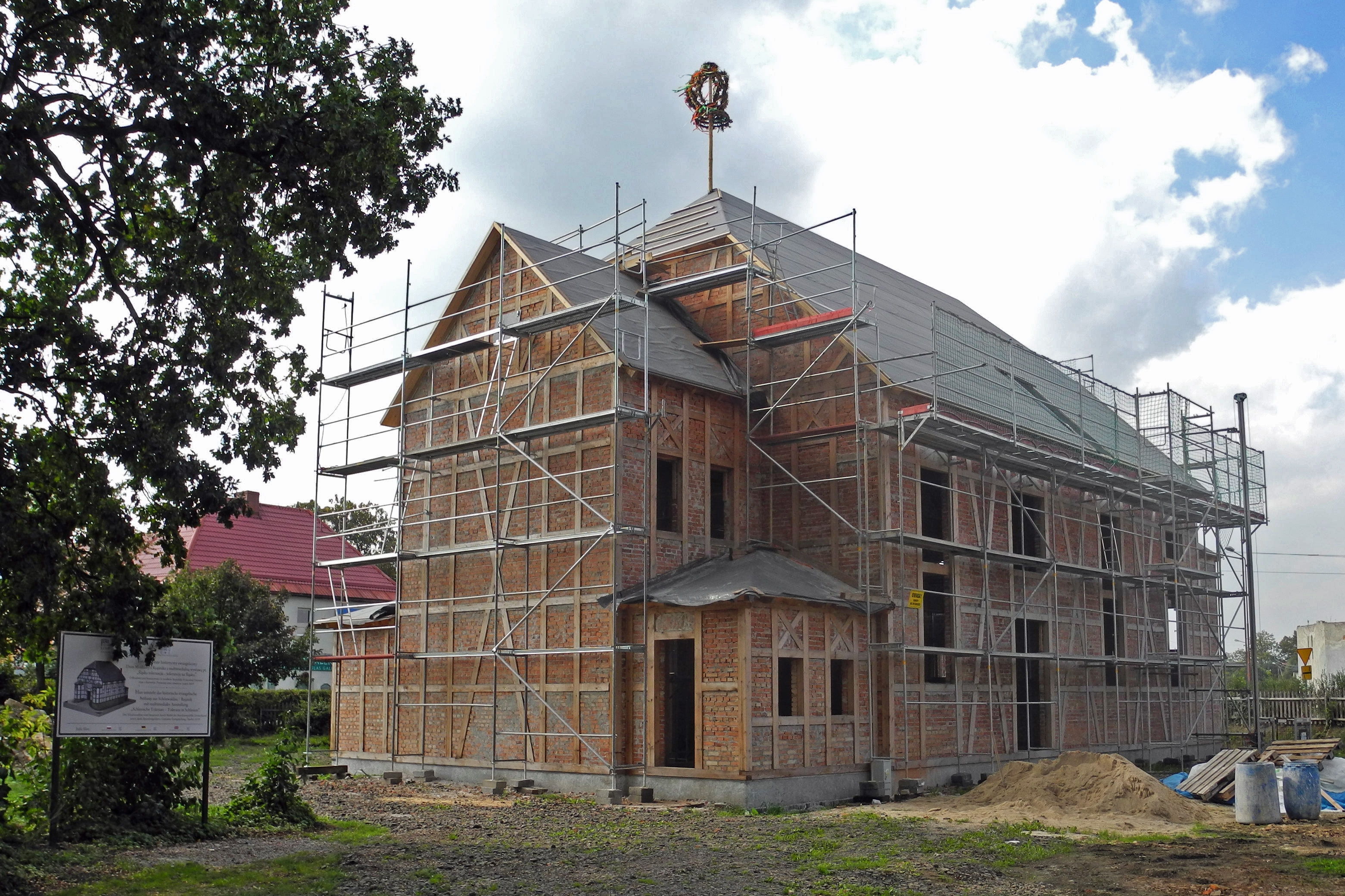 Bethauskirche am Schloss Lomnitz (Łomnica) nach dem Richtfest im Sept. 2018